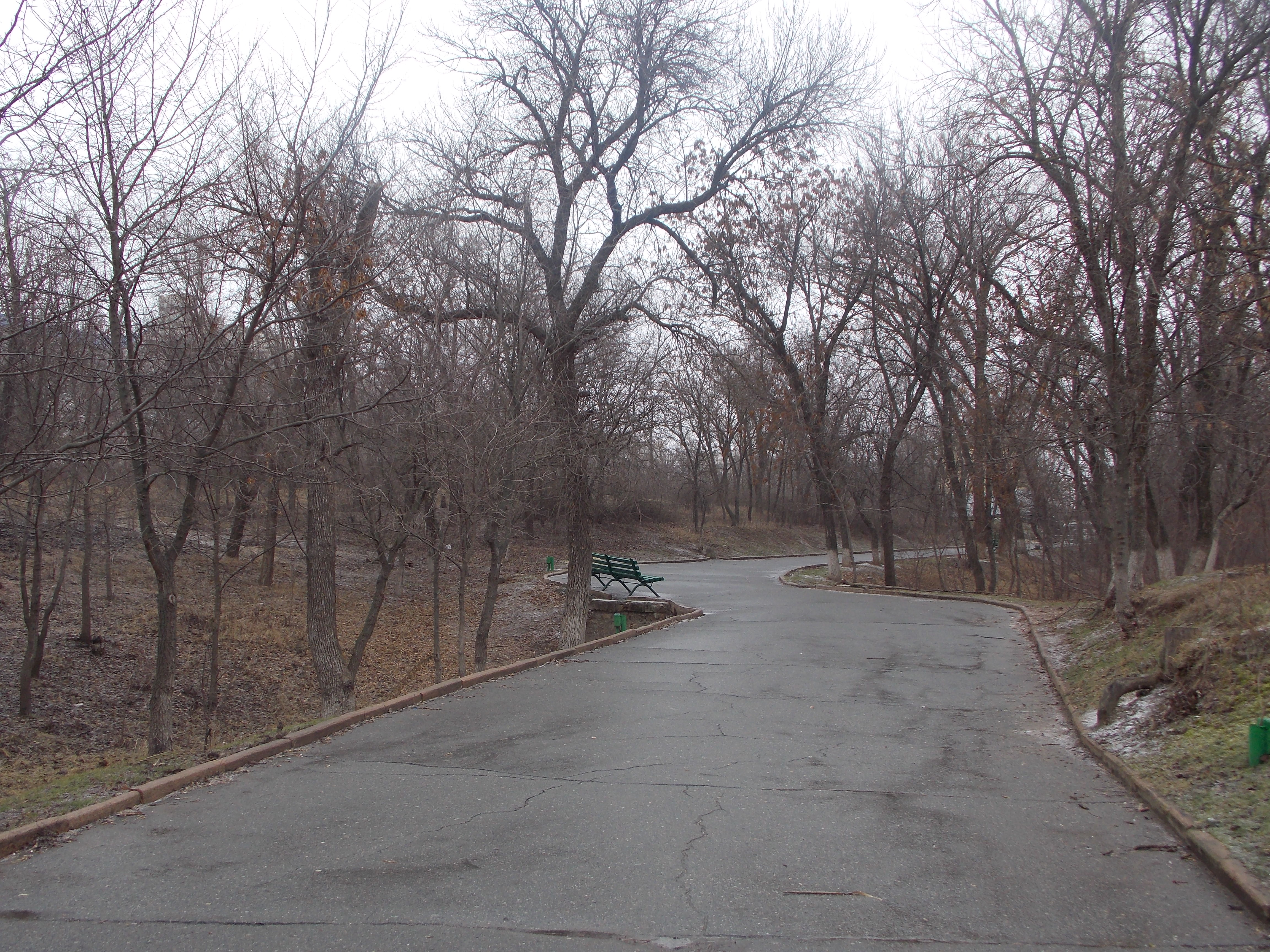 Парк "Дружба" в Элисте, Калмыкия